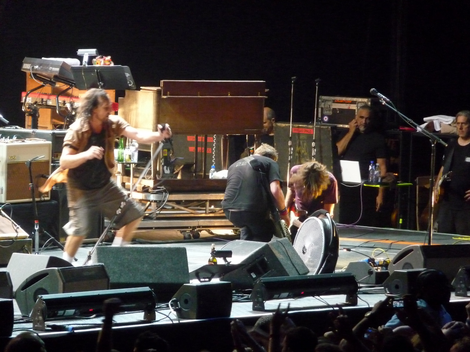 August 2009